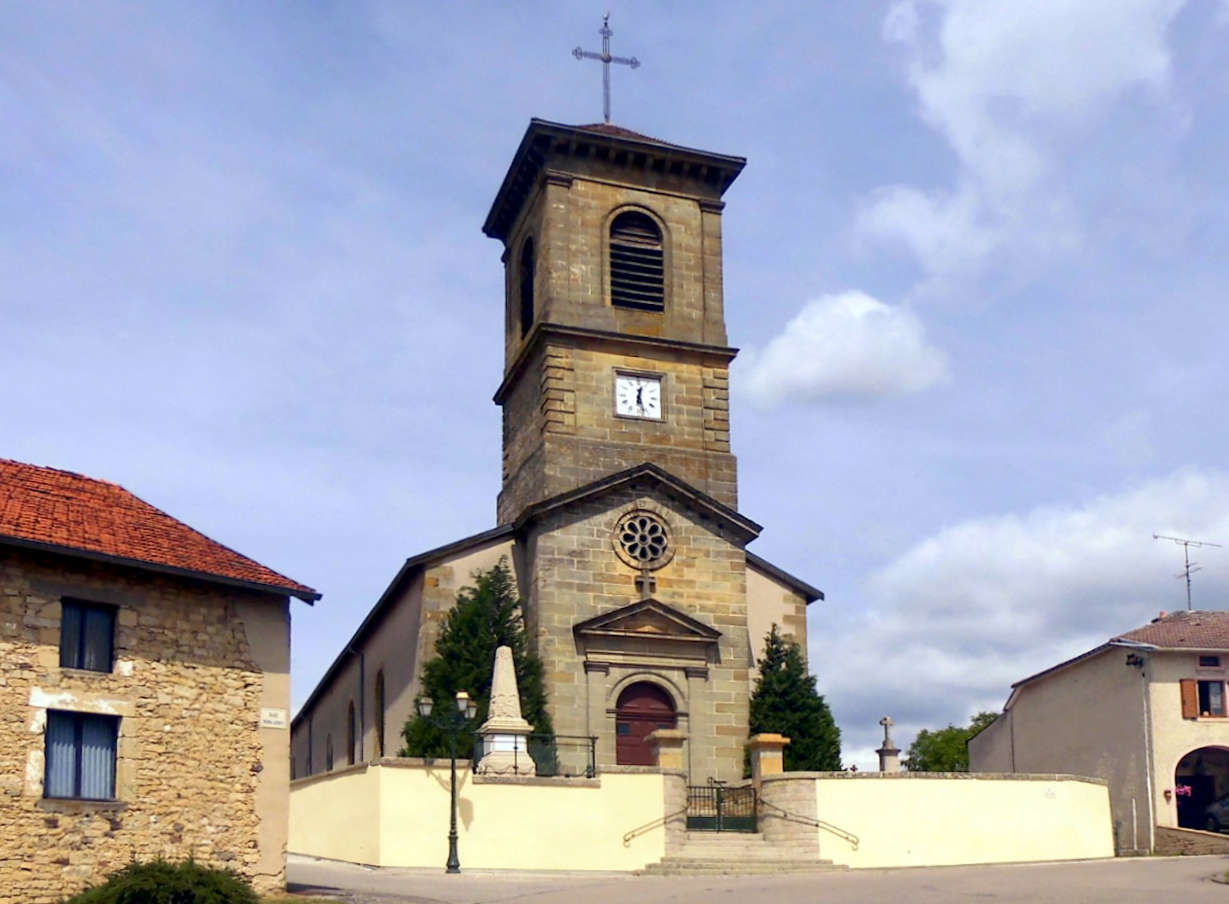 L'église Saint-Remi de Saint-Remimont